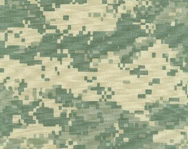 Camouflage UCP